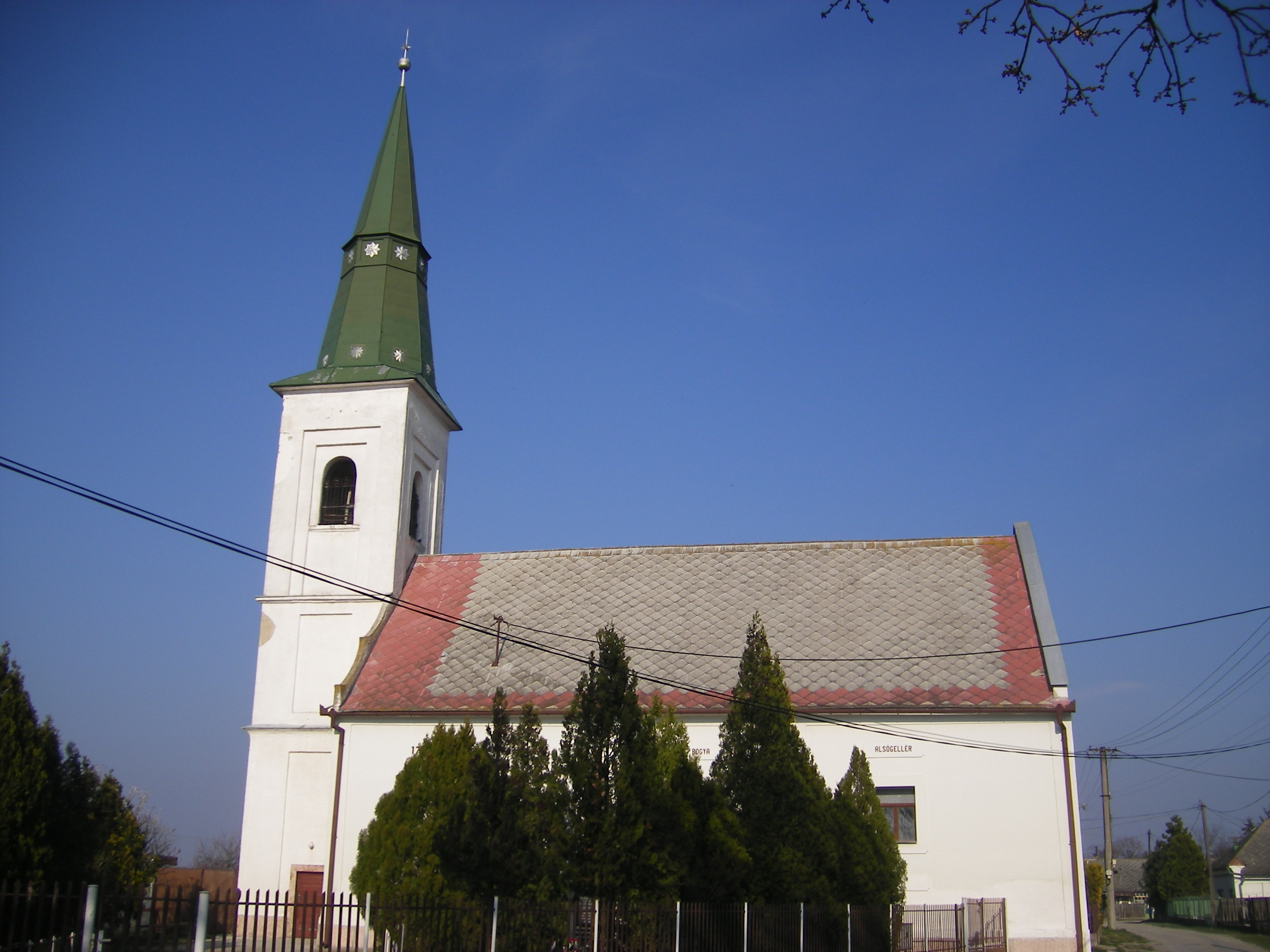 Gellér református temploma.